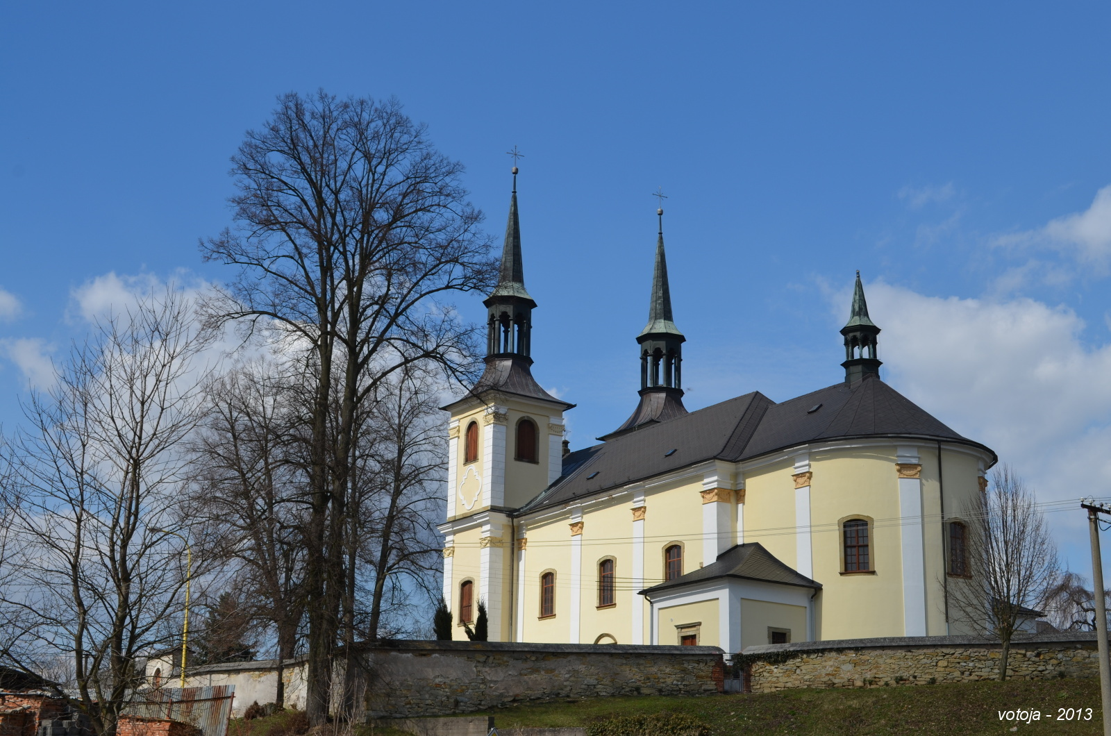 LETOHRAD - ORLICE, kostel Nanebevzetí Panny Marie